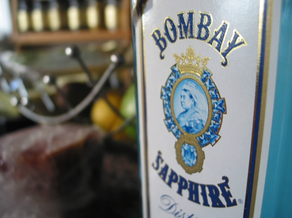 Џин.